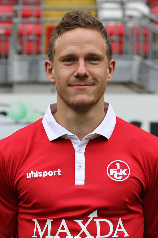 Marcel Gaus